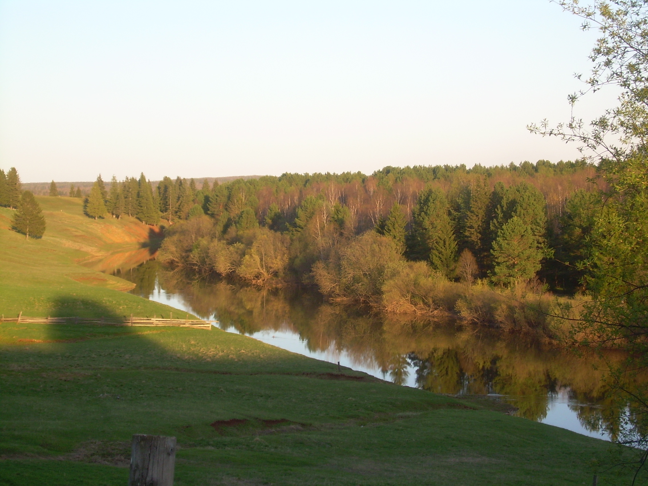 Фотография с изображением реки Кама в верховьях в окрестностях села Сергино (Балезинский район, Удмуртская Республика). Сделана лично мною 18 мая 2009 г. в ходе полевого выезда